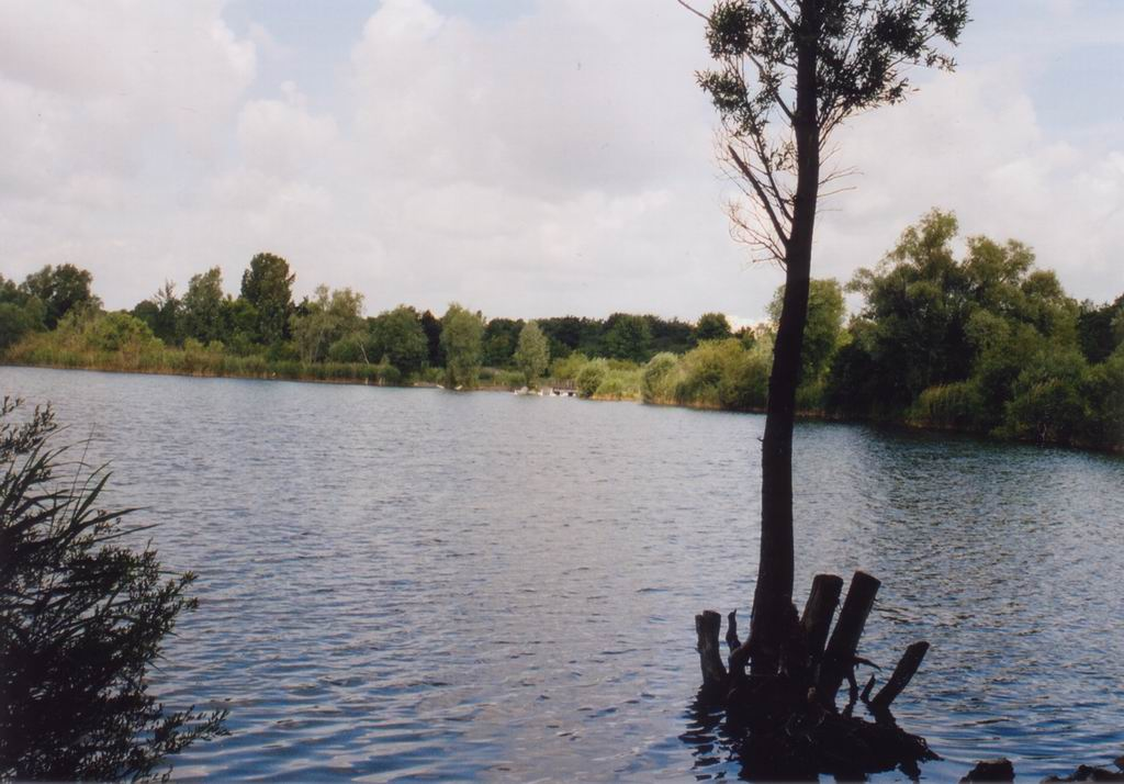 Spandau, Spekte-Grünzug, am Kiesteich